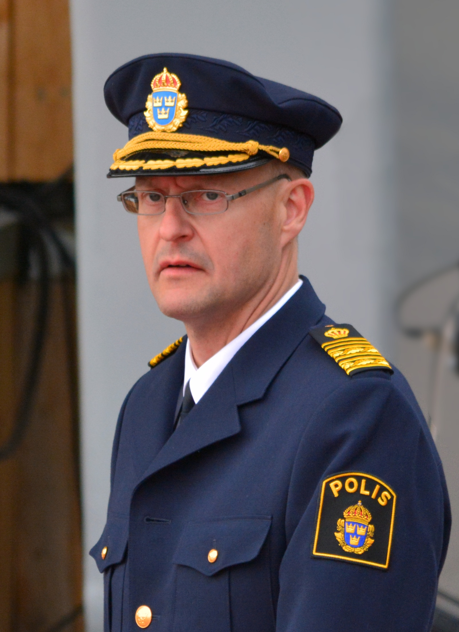 Stockholms länspolismästare Mats Löfving.